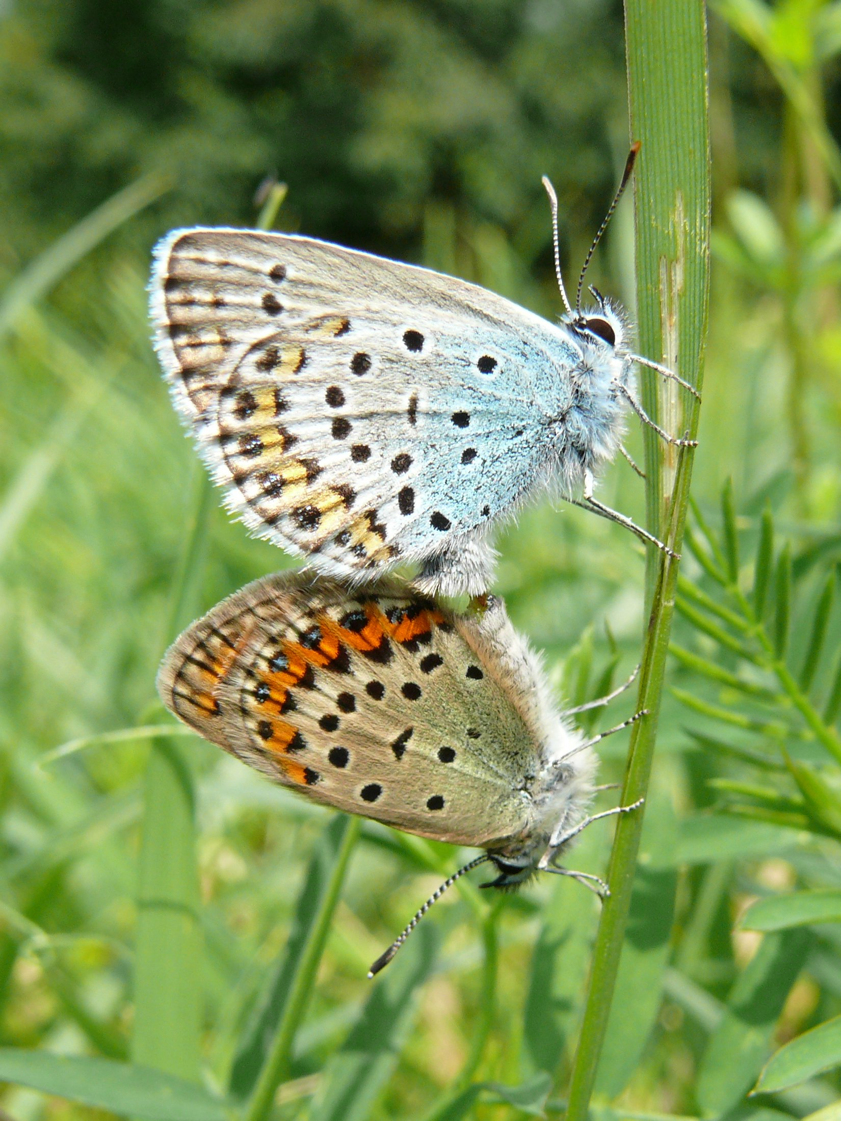 Lycaeidas idas